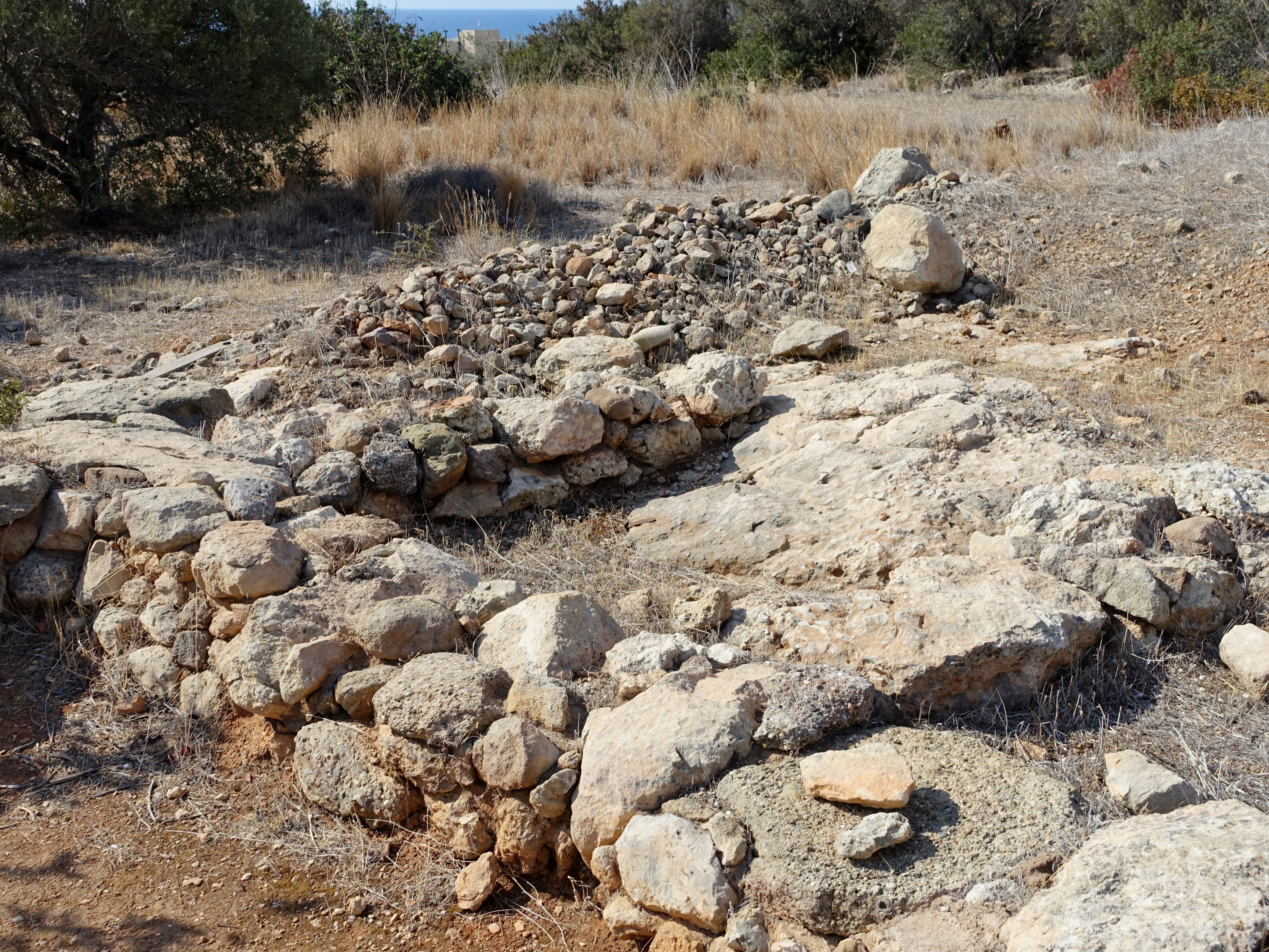 Ausgrabungsstätte der minoischen Villa von Makrygialos, Kreta, Griechenland